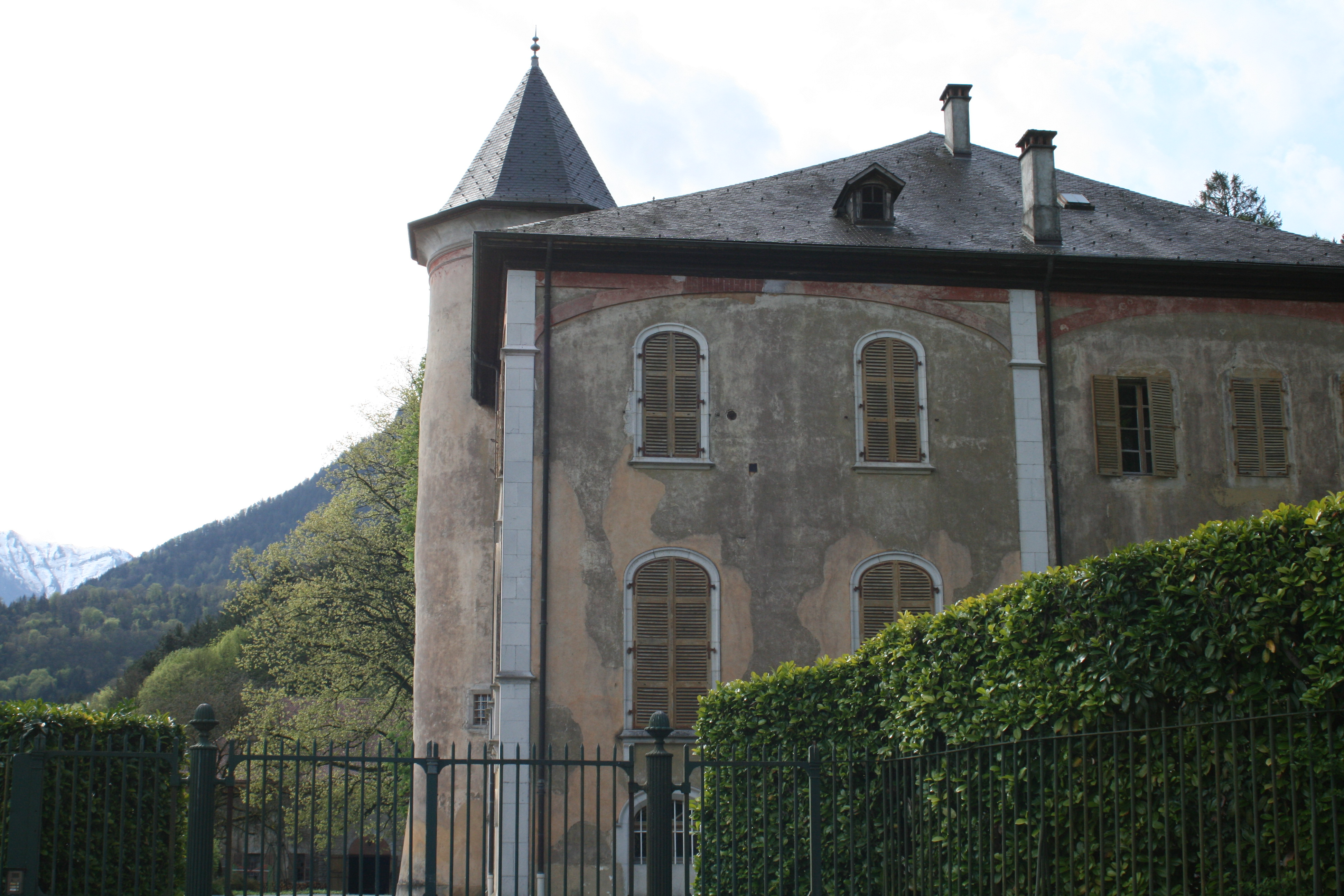 Façade nord du Château de Giez